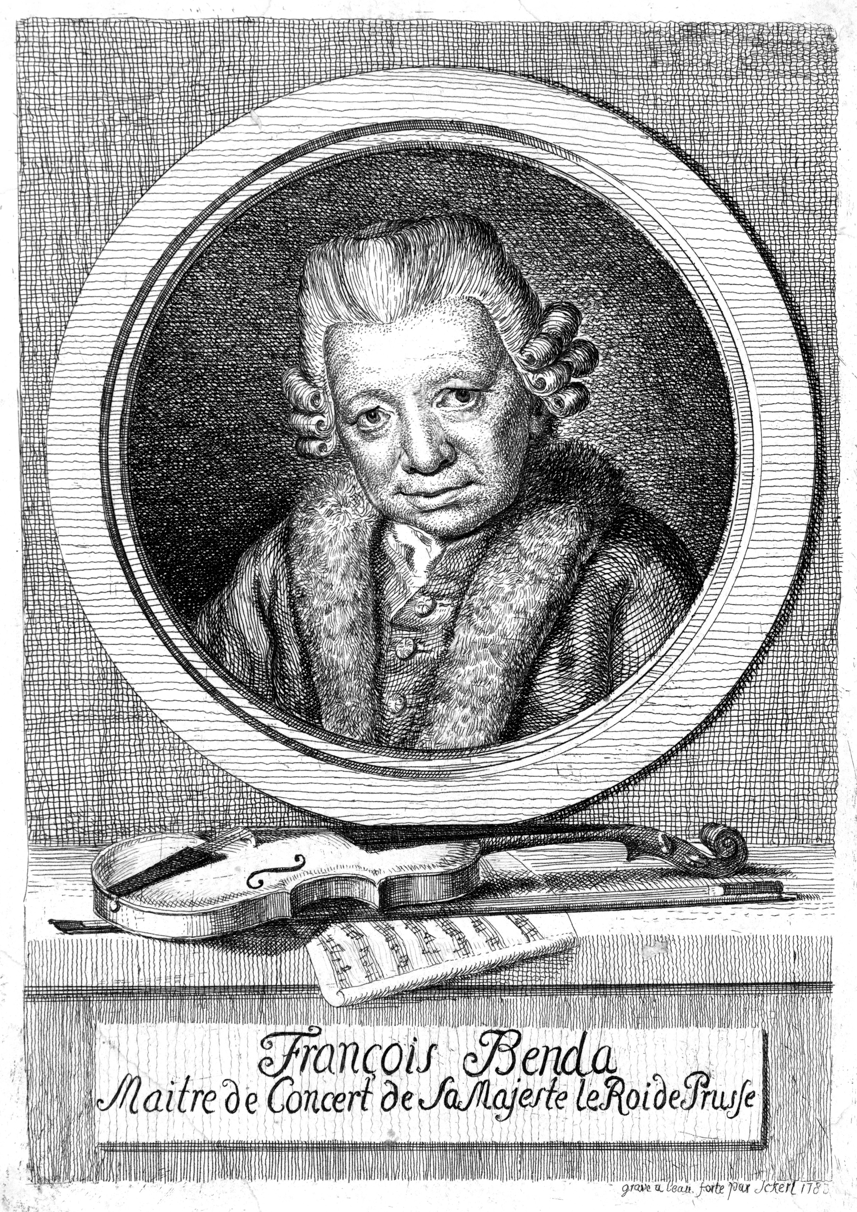 Depicted person: František Benda